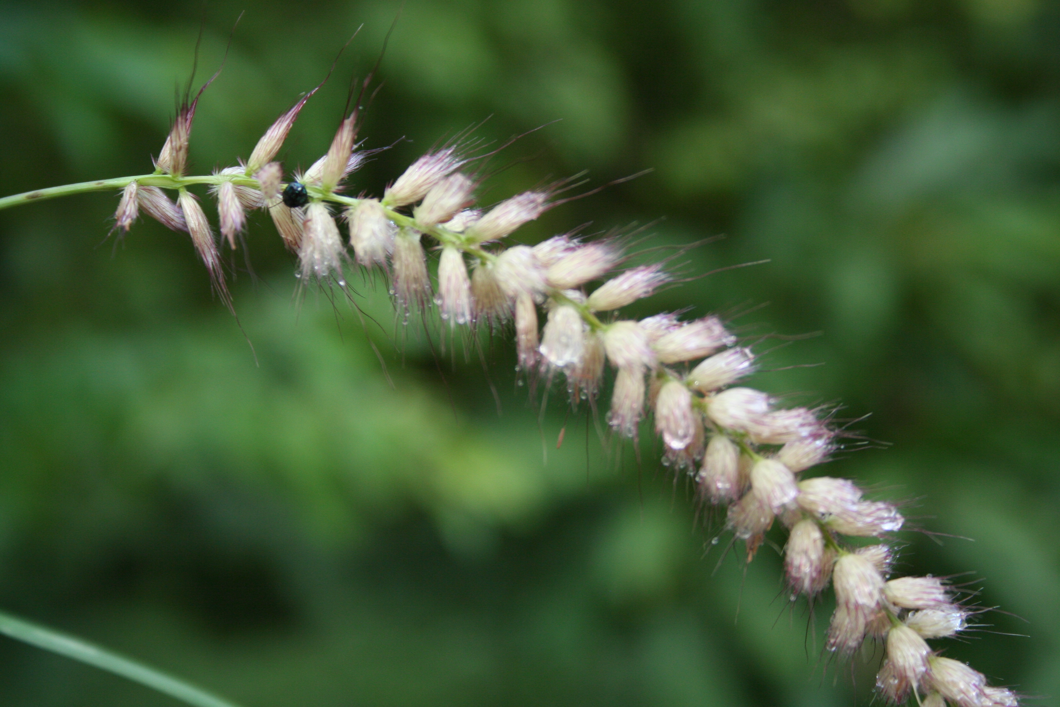 Pennisetum pedicellatum, Burkina Faso